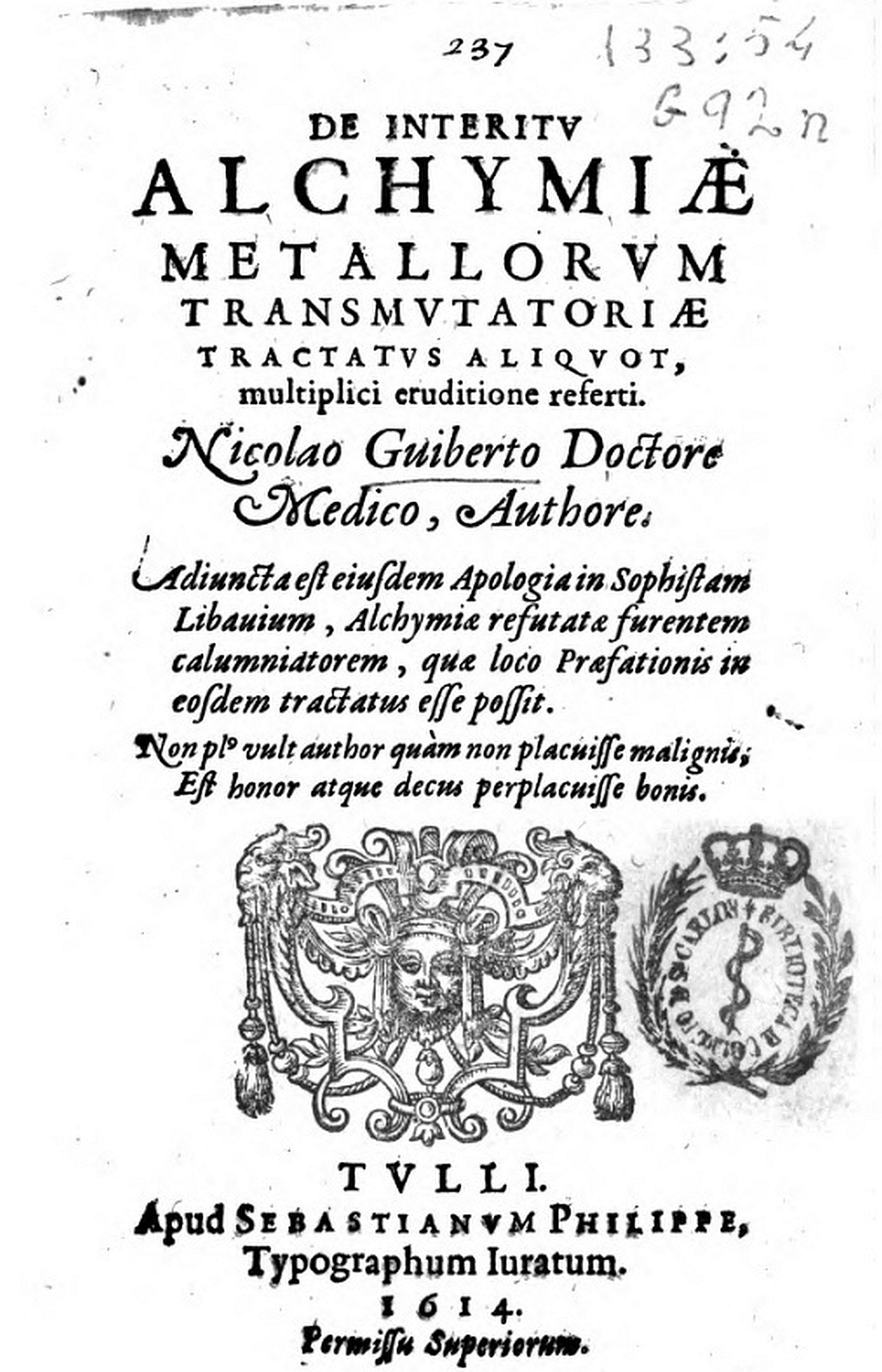 Title page of „De interitu alchymiæ metallorum transmutatoriæ tractatus aliquot, multiplici eruditione referti / Nicolao Guiberto doctore medico, authore. Adiuncta est eiusdem Apologia in sophistam libauium, alchymiae refutatae furentem calumniatorem, quae loco praefationis in eosdem tractatus esse possit …“, — Tulli : apud Sebastianum Philippe …, 1614.